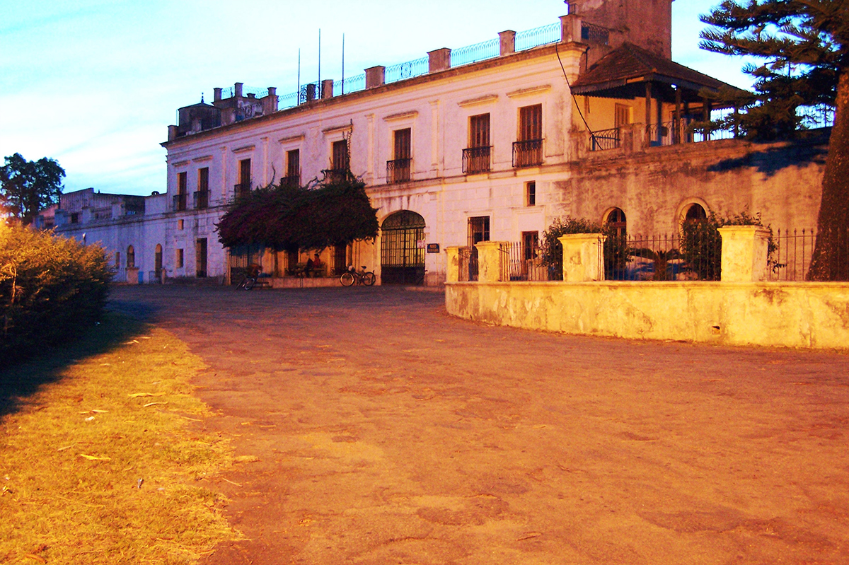 Edificios del casco de Estancia del Barón de Maua. Ubicada en el departamento de Soriano